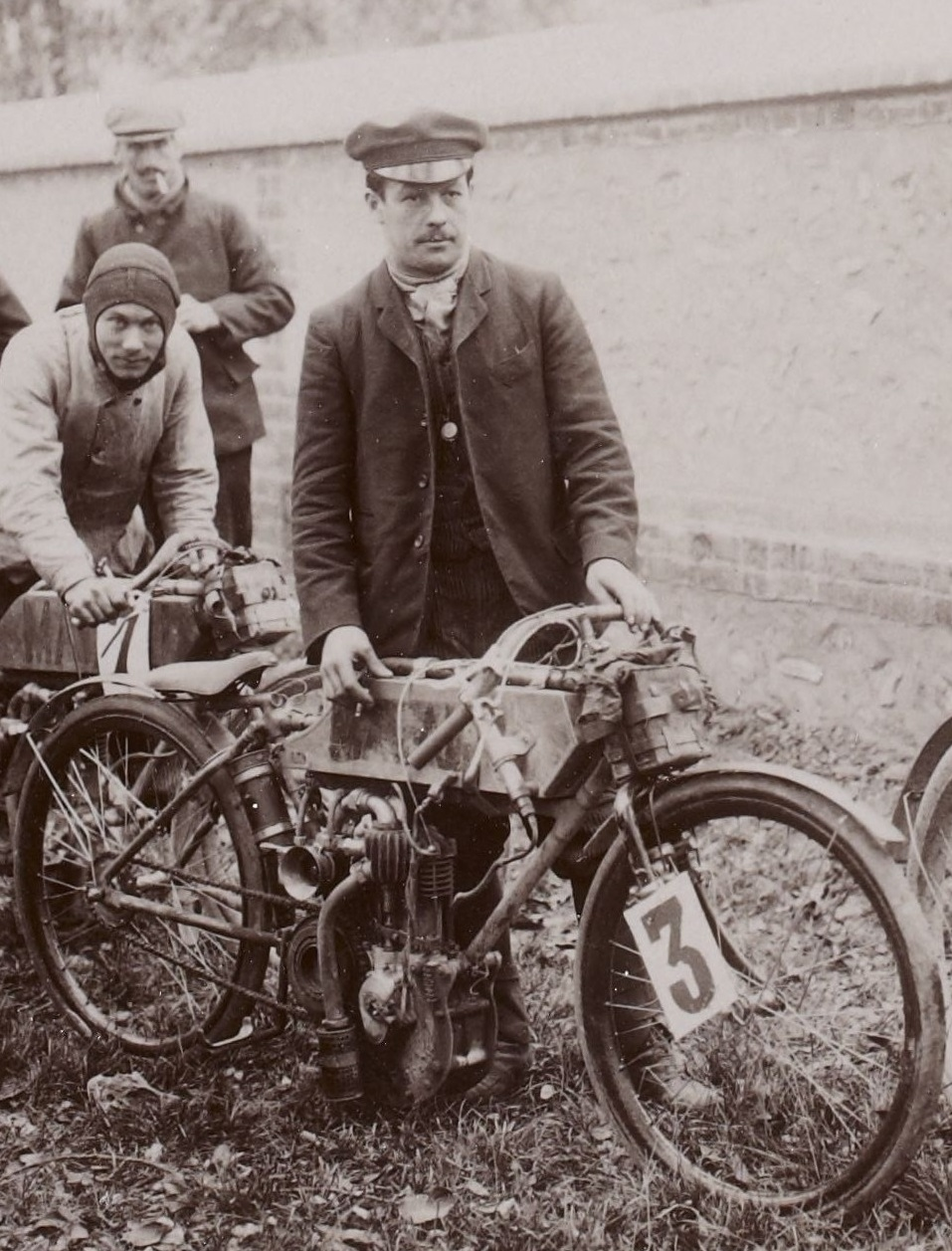 [Collection Jules Beau. Photographie sportive] : T. 28. Année 1904 / Jules Beau : F. 26v. [Course de côte de Château-Thierry, organisée par l' Auto, 23 octobre 1904]